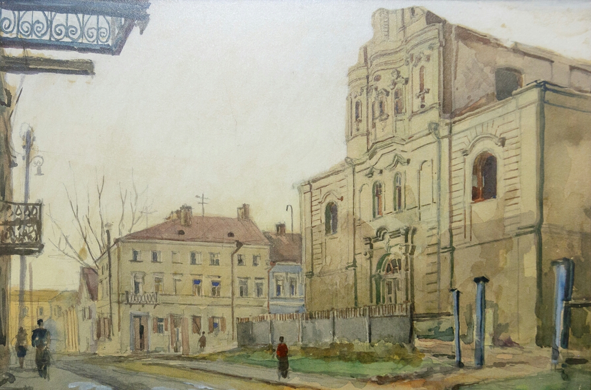 Акварель Иосифа Лангбарда «Минск». Местонахождение — Музей истории города Минска.